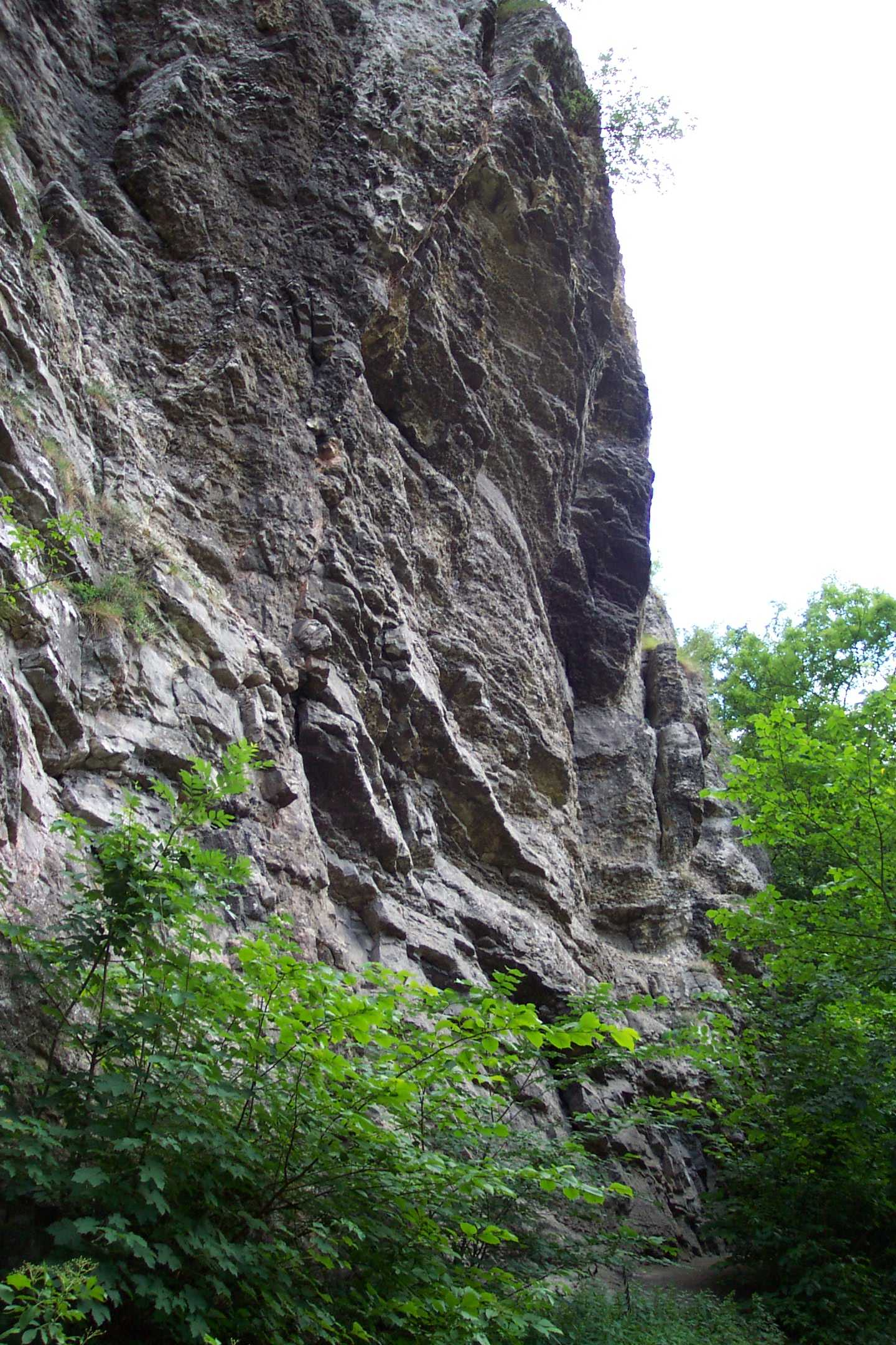 Skály ve Svatém Janu pod Skalou - Rocks in Svatý Jan pod Skalou (Czech Republic)